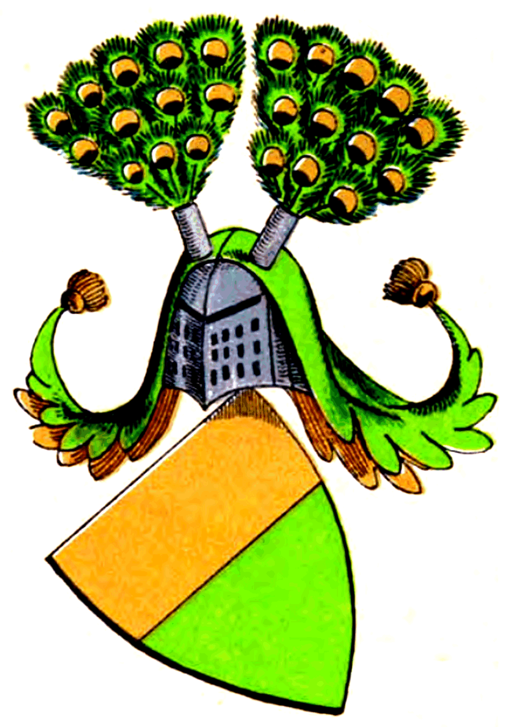 Wappen derer von Schnebelin (Schnewlin)